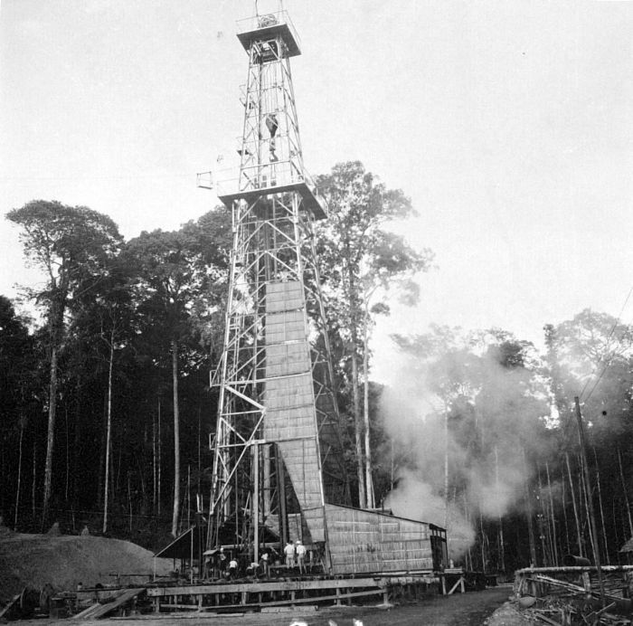 Repronegatief. Boortoren bij Boeloengan van de N.K.P. Mij